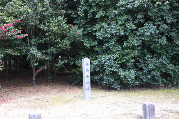 京都御苑 西園寺邸跡